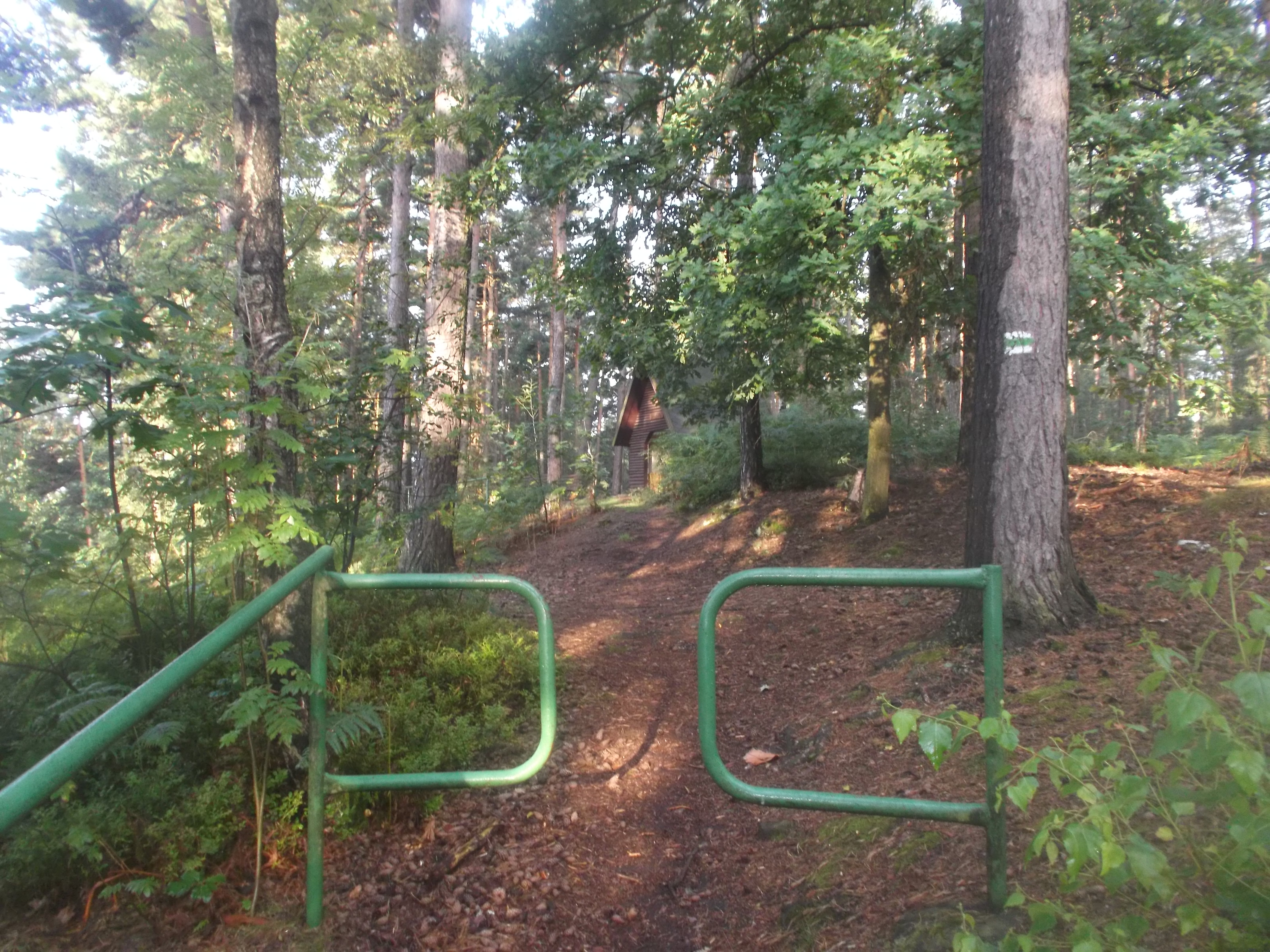 Aufgang zur Erashöhe.